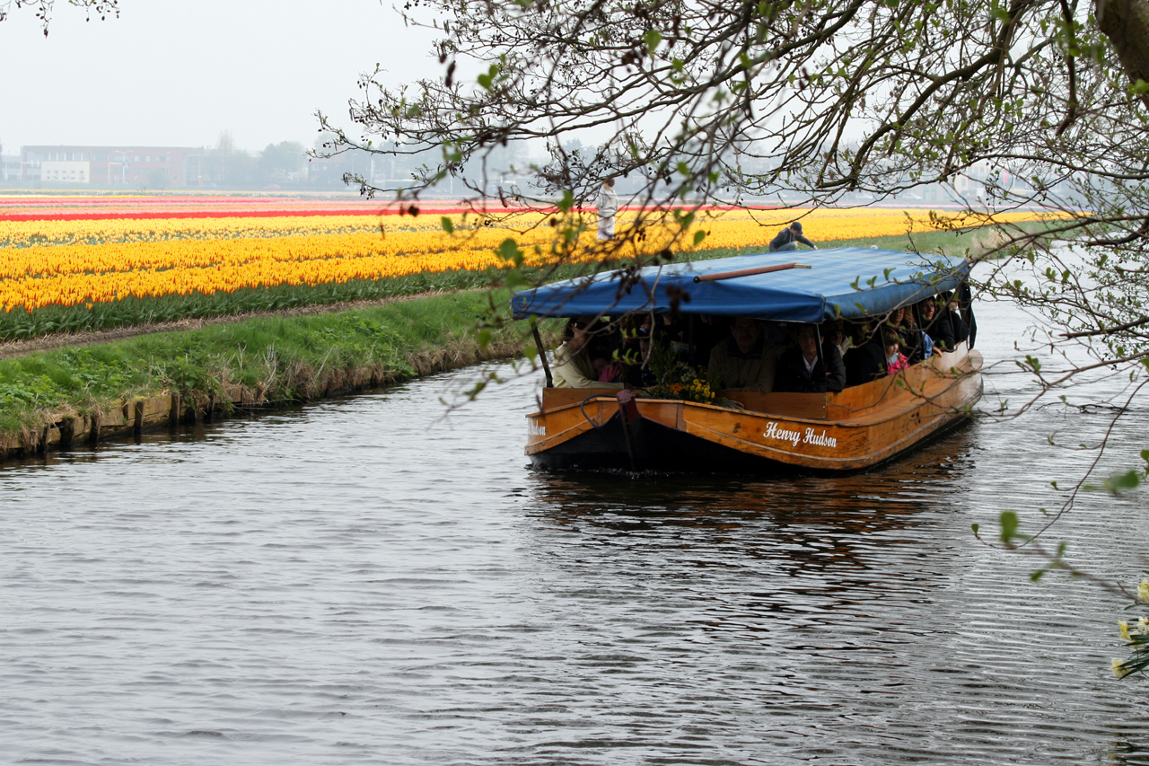 Champs de tulipes vus du Parc floral de Keukenhof